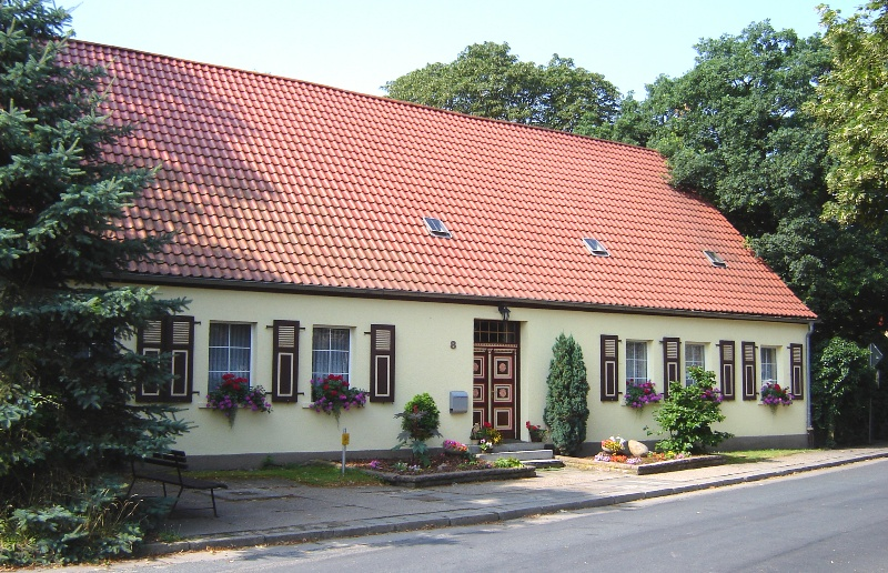 Pfarrhaus in Gommern-Nedlitz (Sachsen-Anhalt)